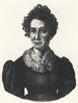 Porträt der deutschen Schriftstellerin Amalie Schoppe.